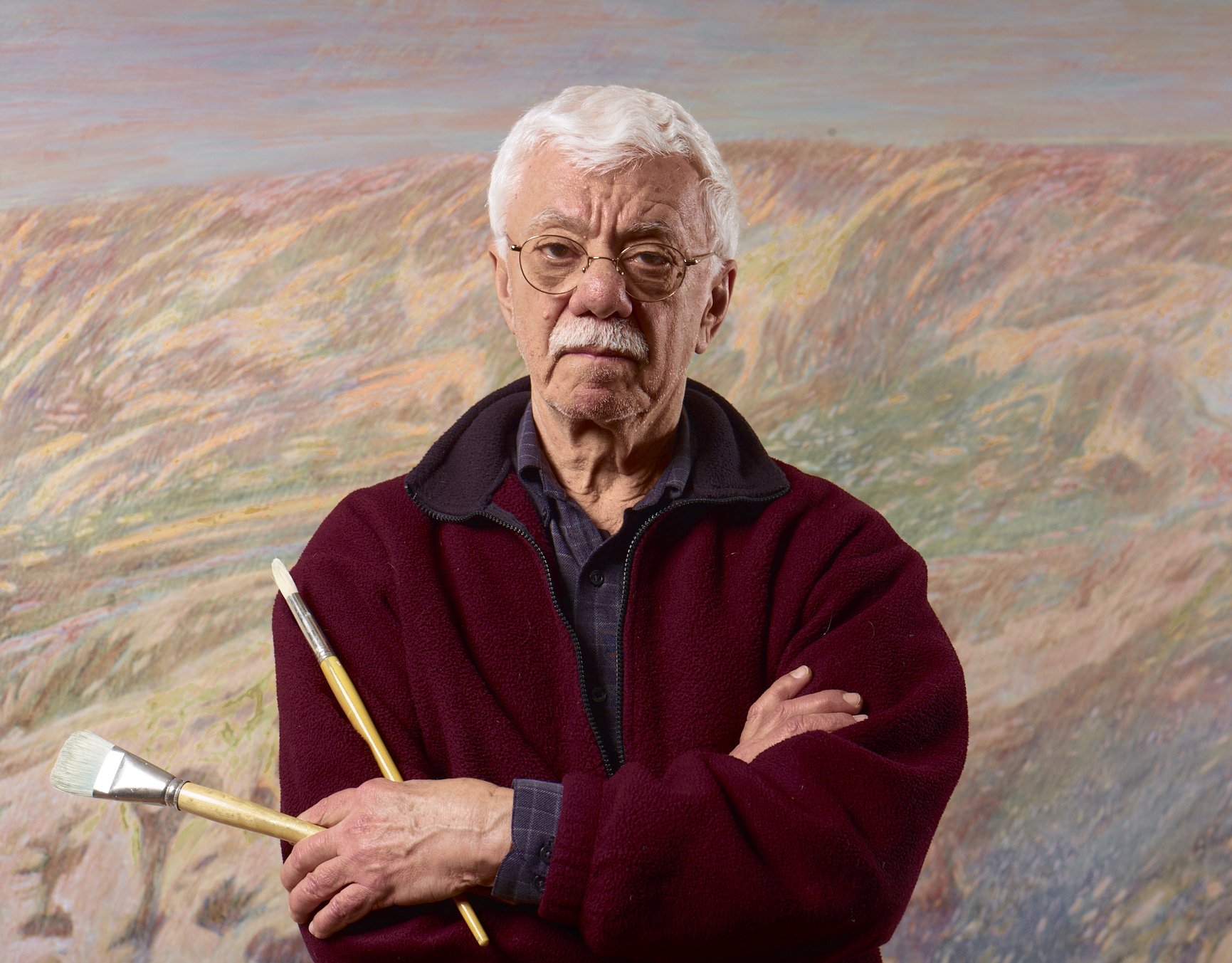 Mel Pekarsky in his studio, 2013